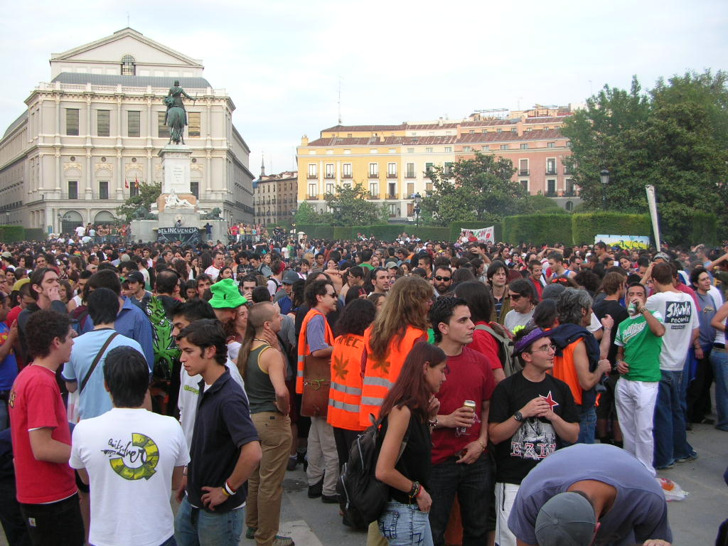 Million marijuana marchMillion Marijuana March